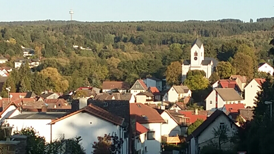 Pfaffenwiesbacher Ortsansicht mit Kirche und Steinkopfturm nach Osten 2018